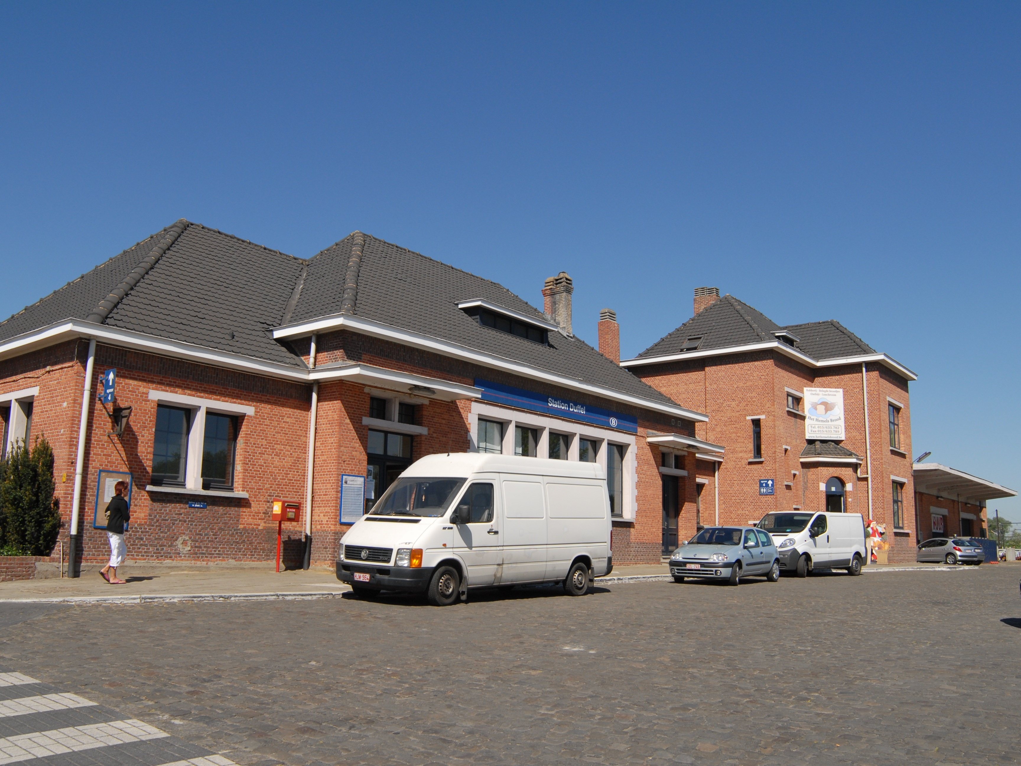 Station Duffel